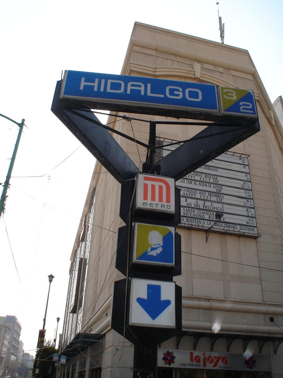 ESTACION HIDALGO